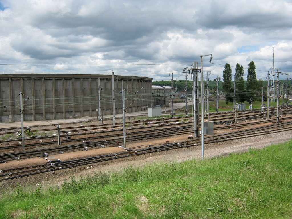 Rotonde Dépot SNCF Chalindrey